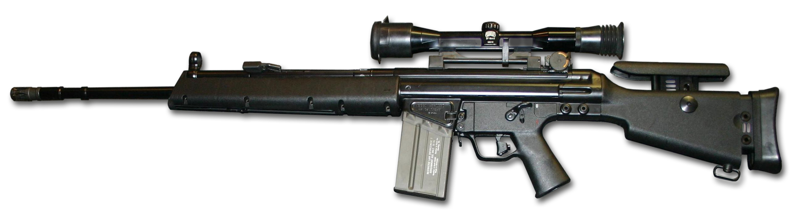 Deutsches Gewehr HK MSG 90